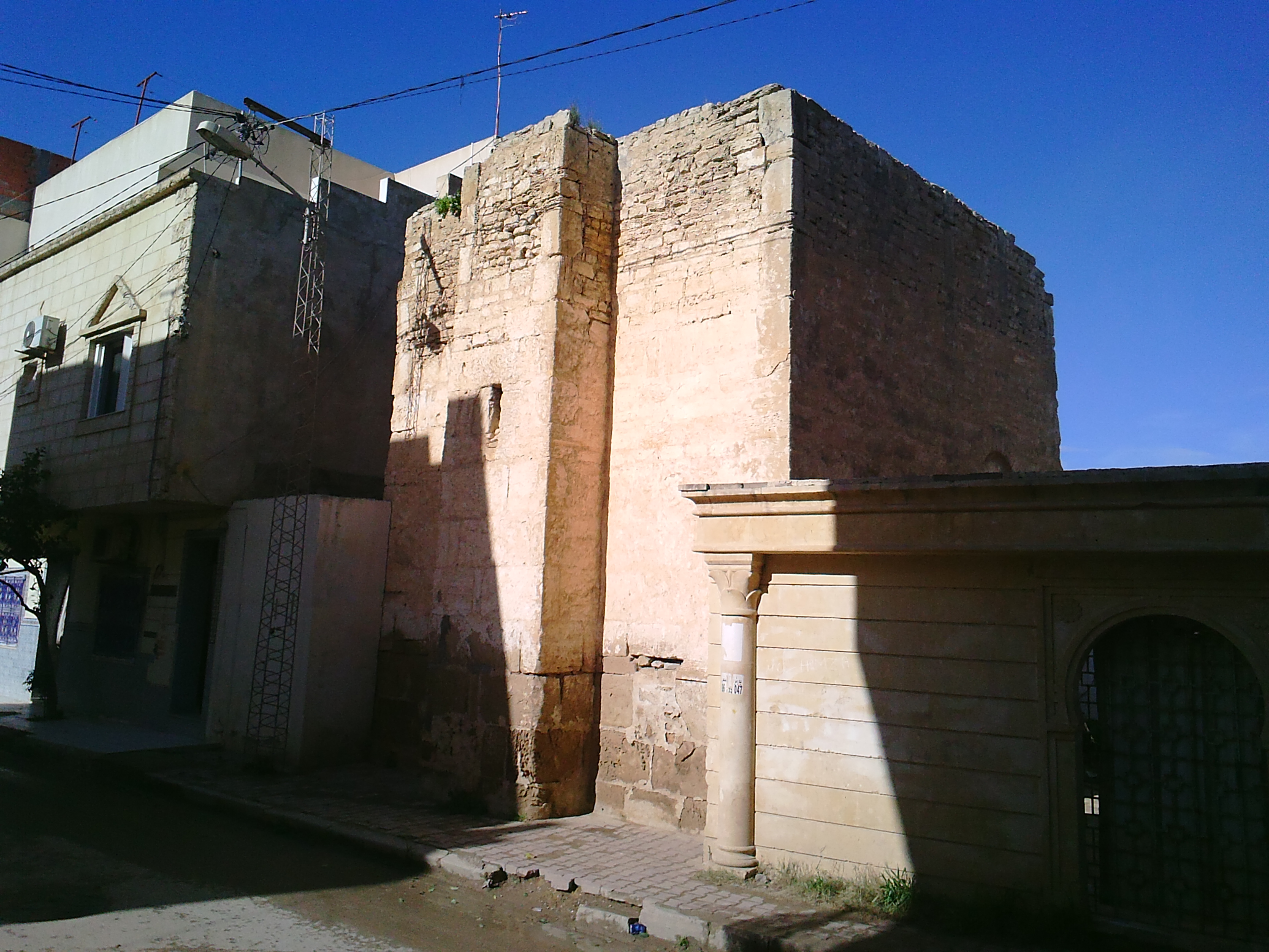 Sidi Helal, Dar Chaabane, Tunisia, 2019